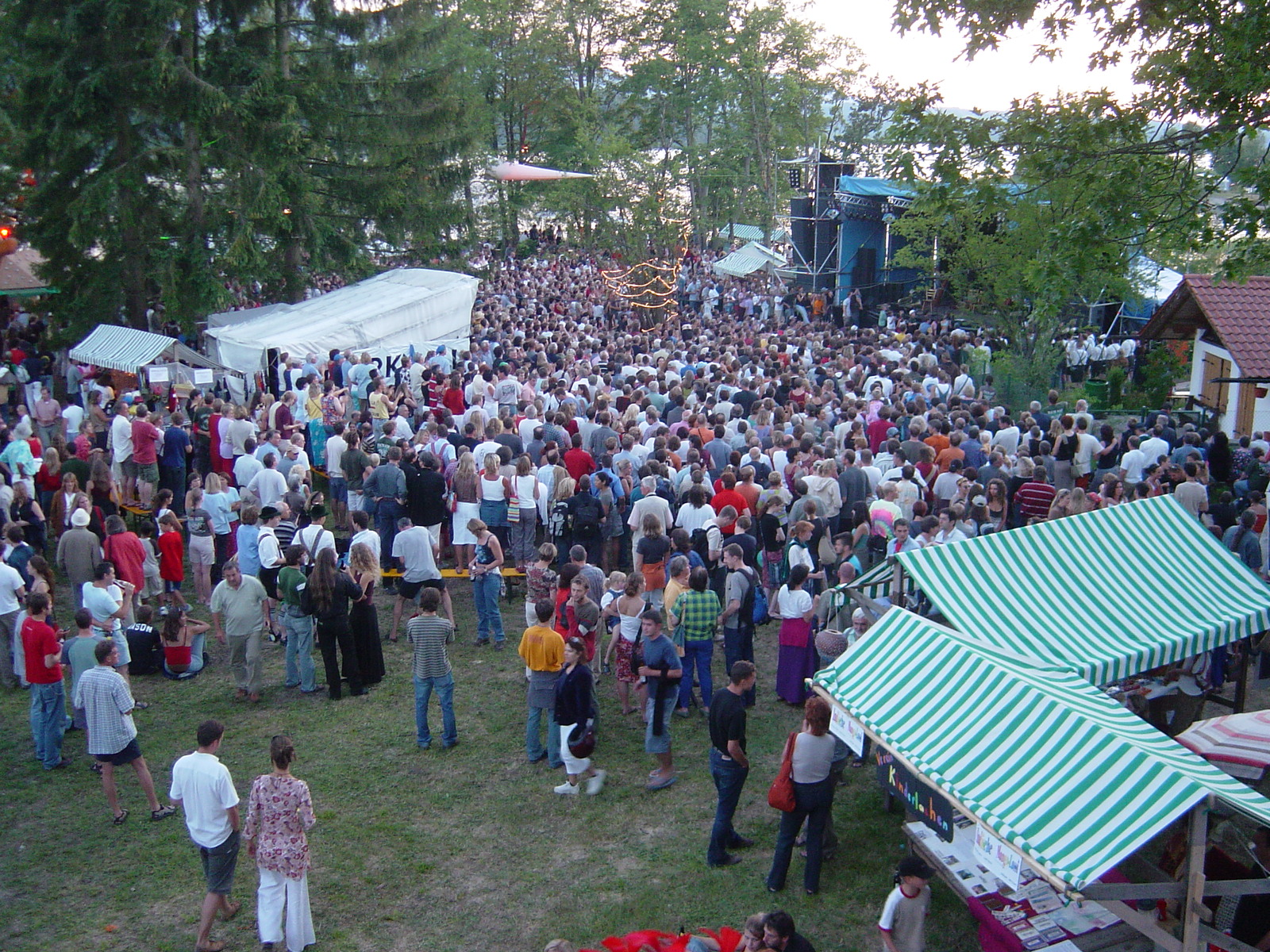 KultURKNALL 2003 Sonstiges: Zur Verfügung gestellt von Menschen Helfen e.V.